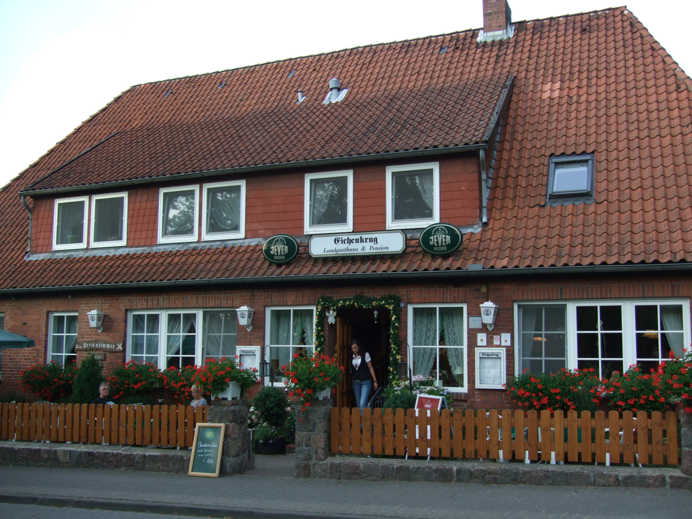 hotel en Dehnsen